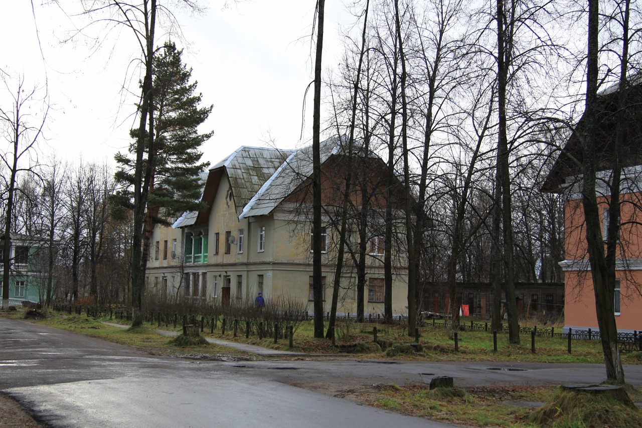 Архитектура в поселке ГЭС